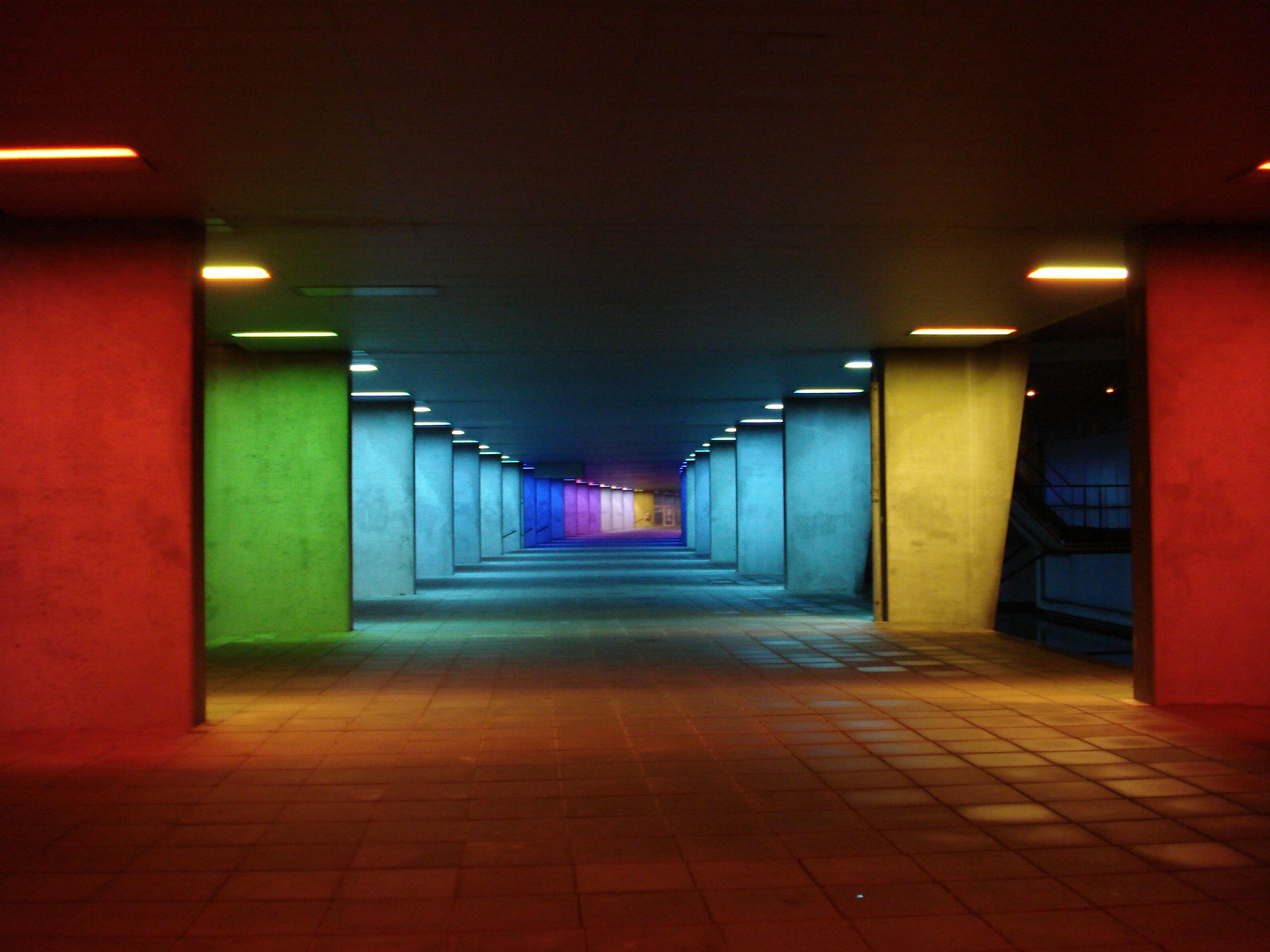 Rotterdam, NAI, Rochussenstraat. Kunstwerk "Lichtarcade" van Peter Struycken. Rotterdam/The Netherlands.